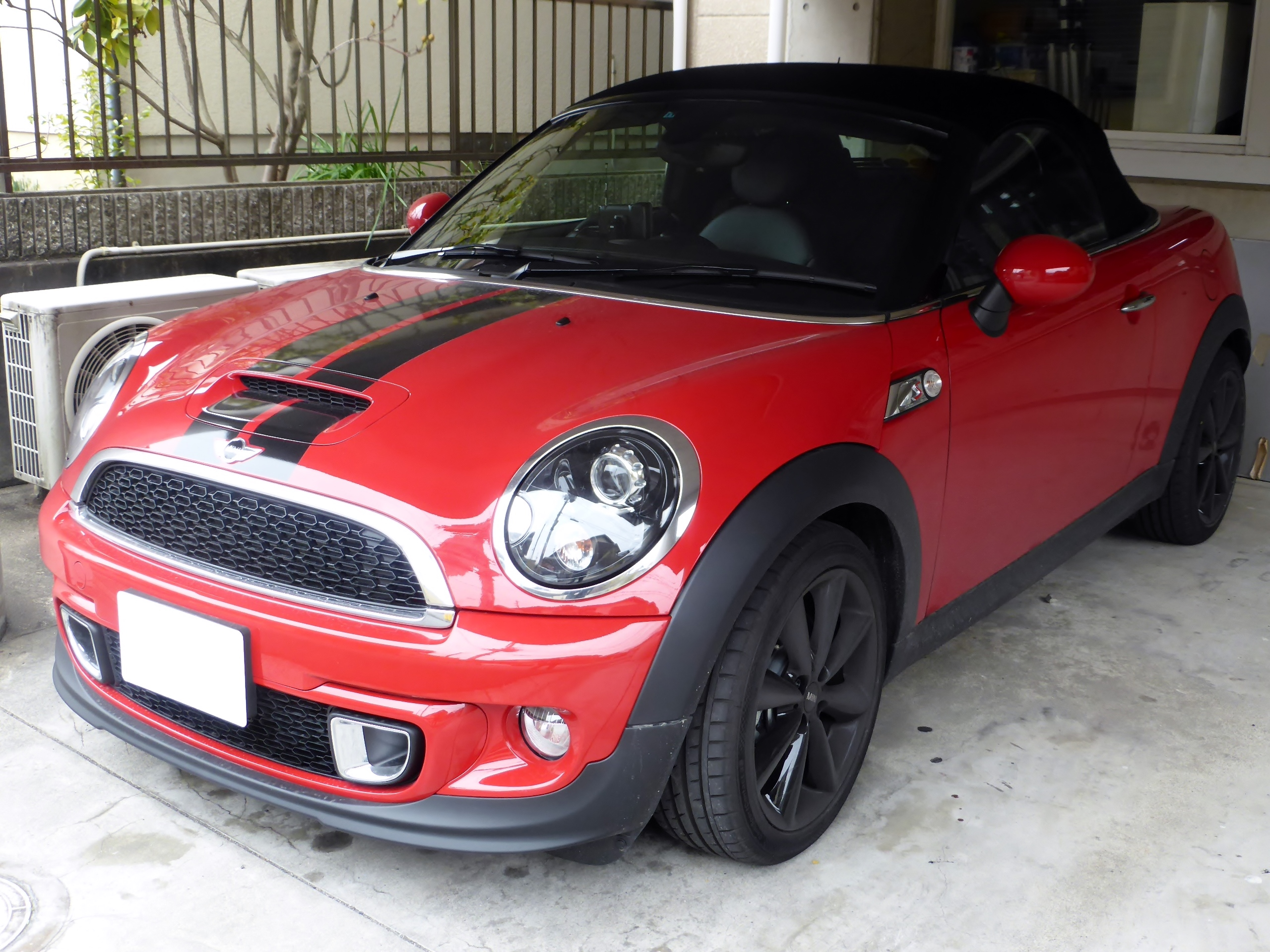 R59型BMW・ミニロードスタークーパーSをフロントから撮影。